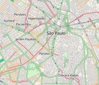 Mapa da cidade de São Paulo, Brasil. This map may be incomplete, and may contain errors. Don't rely solely on it for navigation.